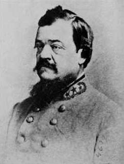 Brigadier General Abraham Buford II